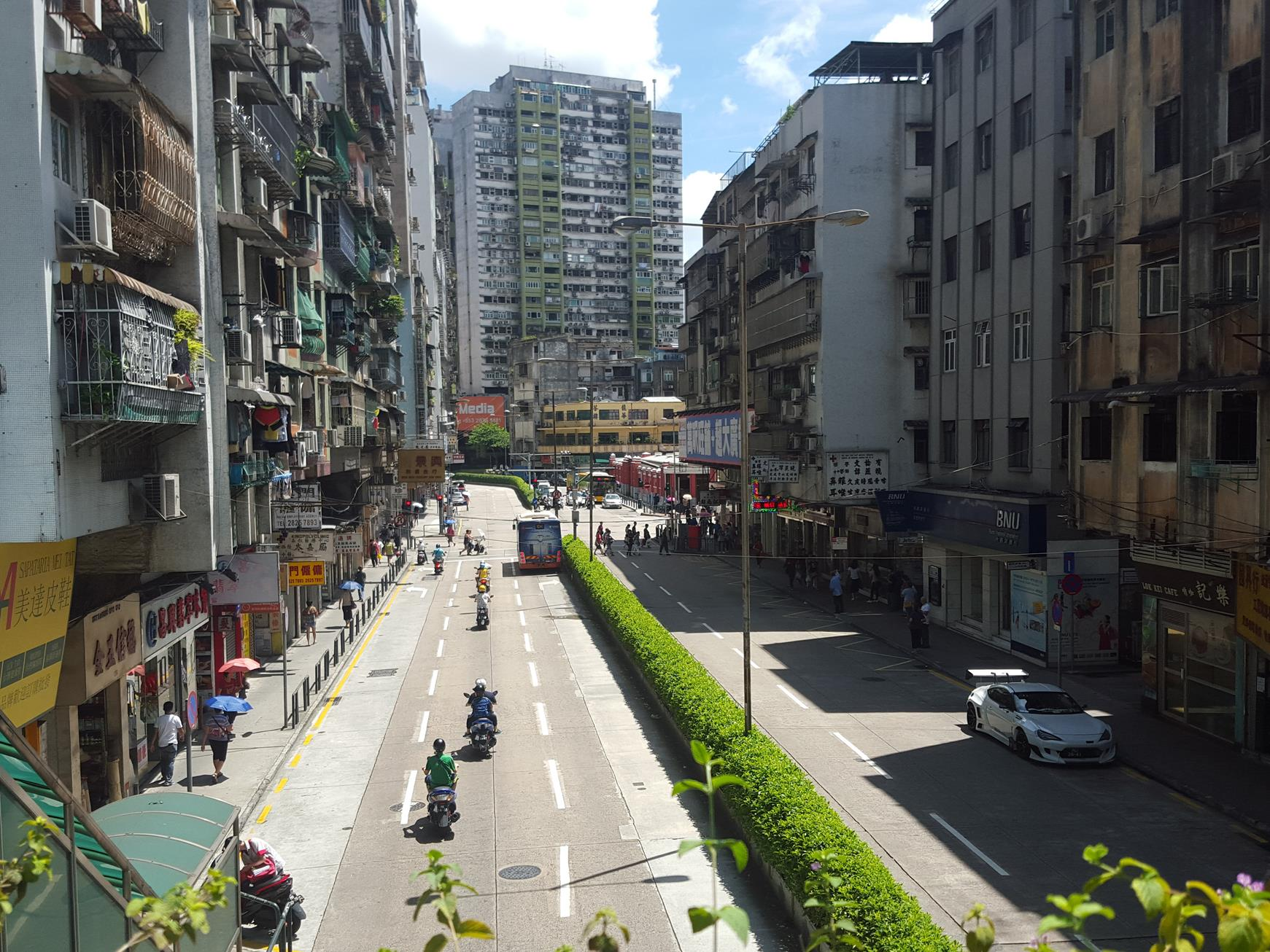 Avenida do Almirante Lacerda